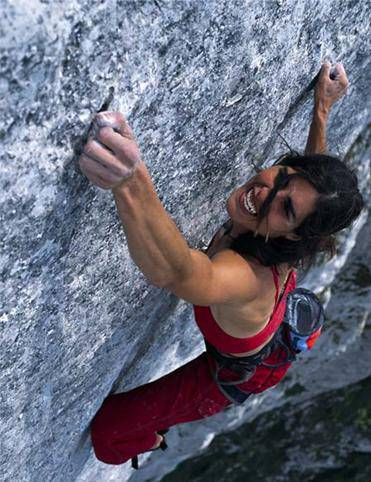 Josune Bereziartu eskalatzailea 2012an